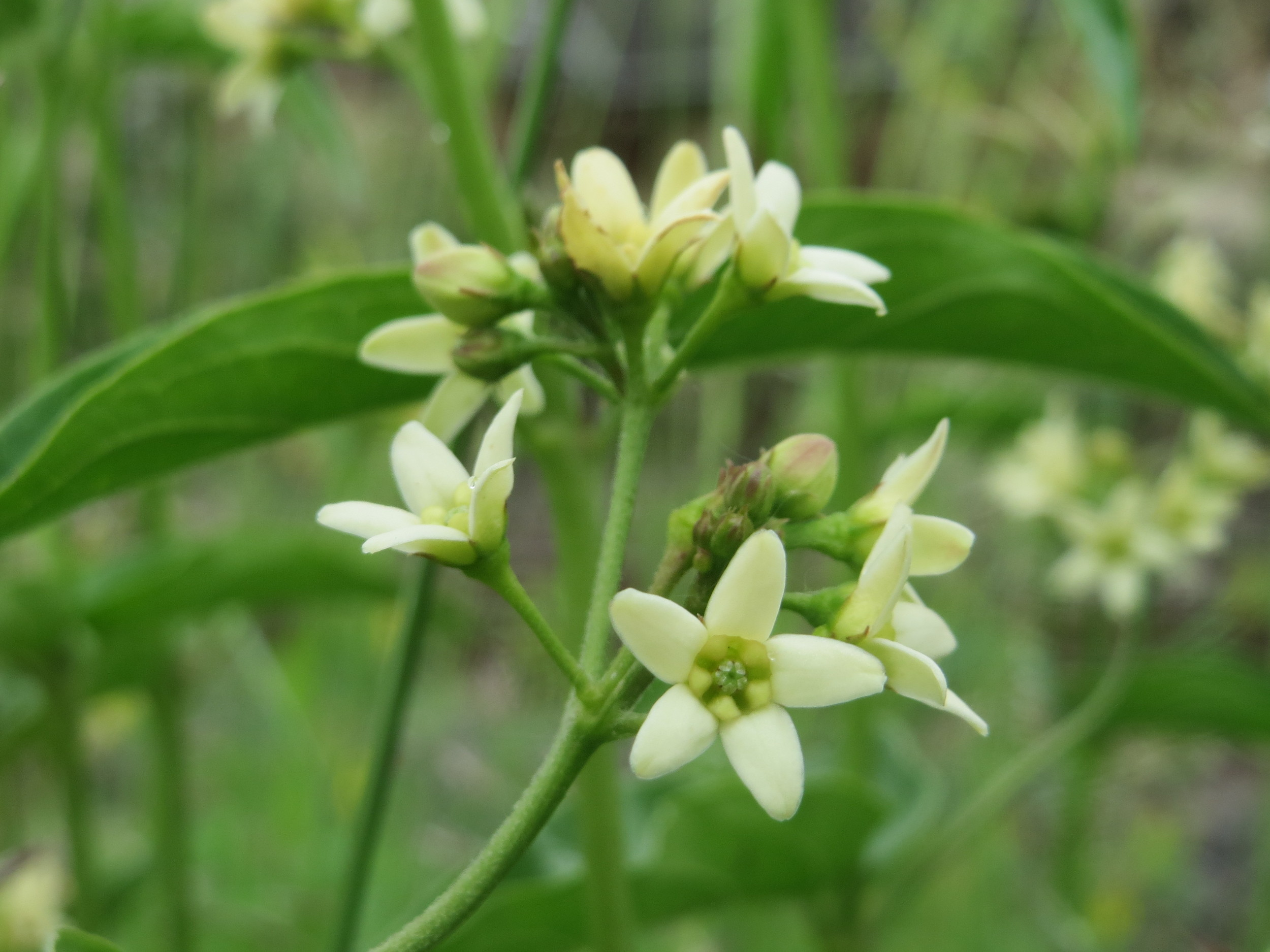 Schwalbenwurz (Vincetoxicum hirundinaria) am Bahndamm bei Oftersheim